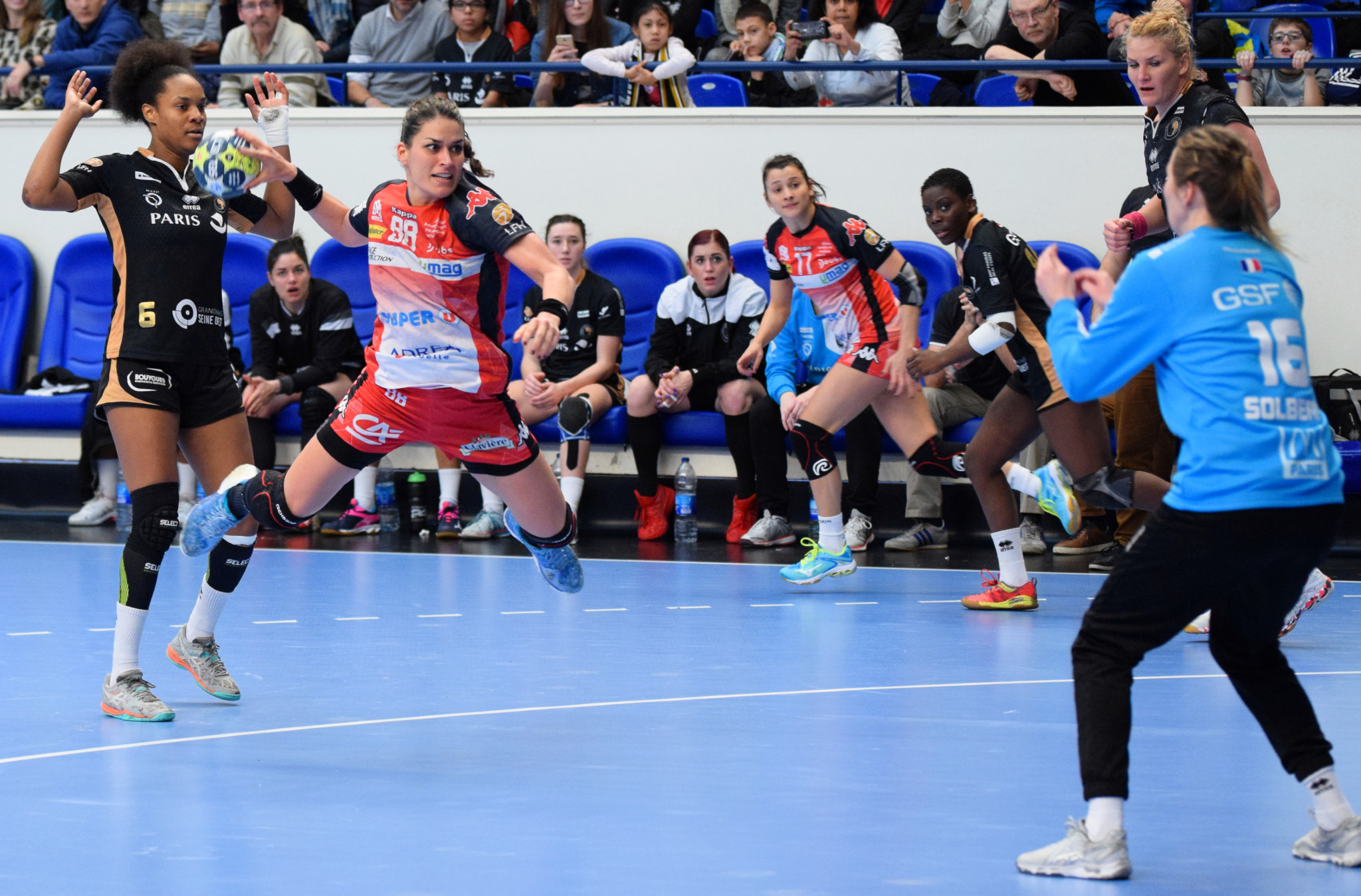 Rencontre Issy Paris Hand / ES Besançon. A Coubertin, le 10 janvier 2018.